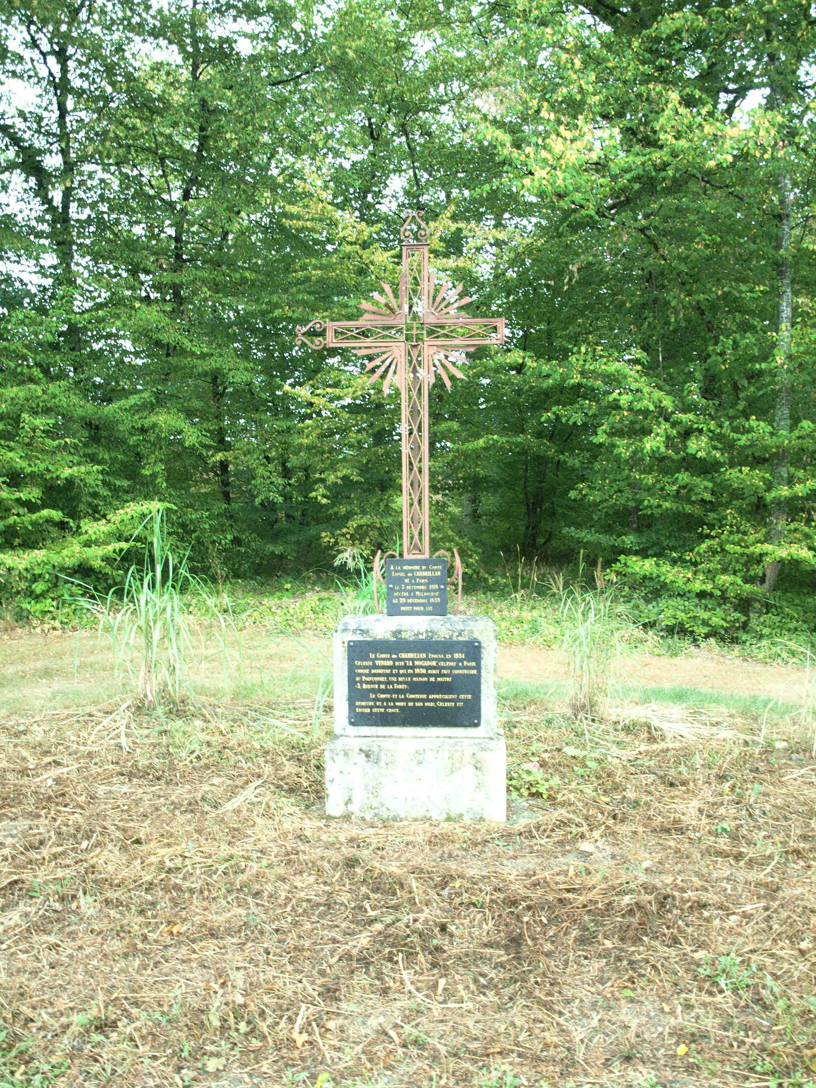 Le Poinçonnet (Indre, France)